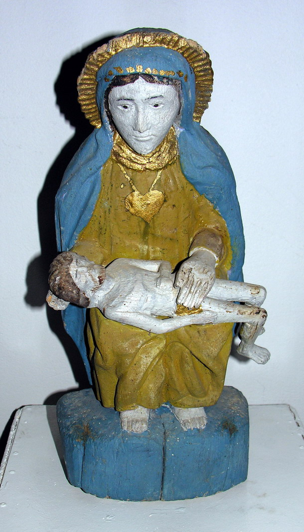 Pieta Foto: Algirdas, 2005 m. lapkričio 3 d., Lietuva